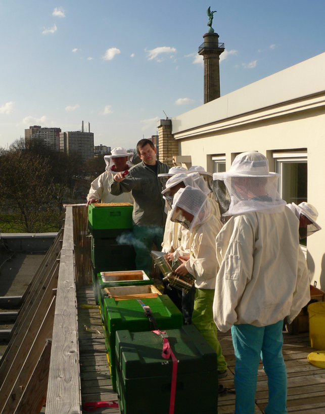 Stadtimkerei in Hannover am Waterlooplatz